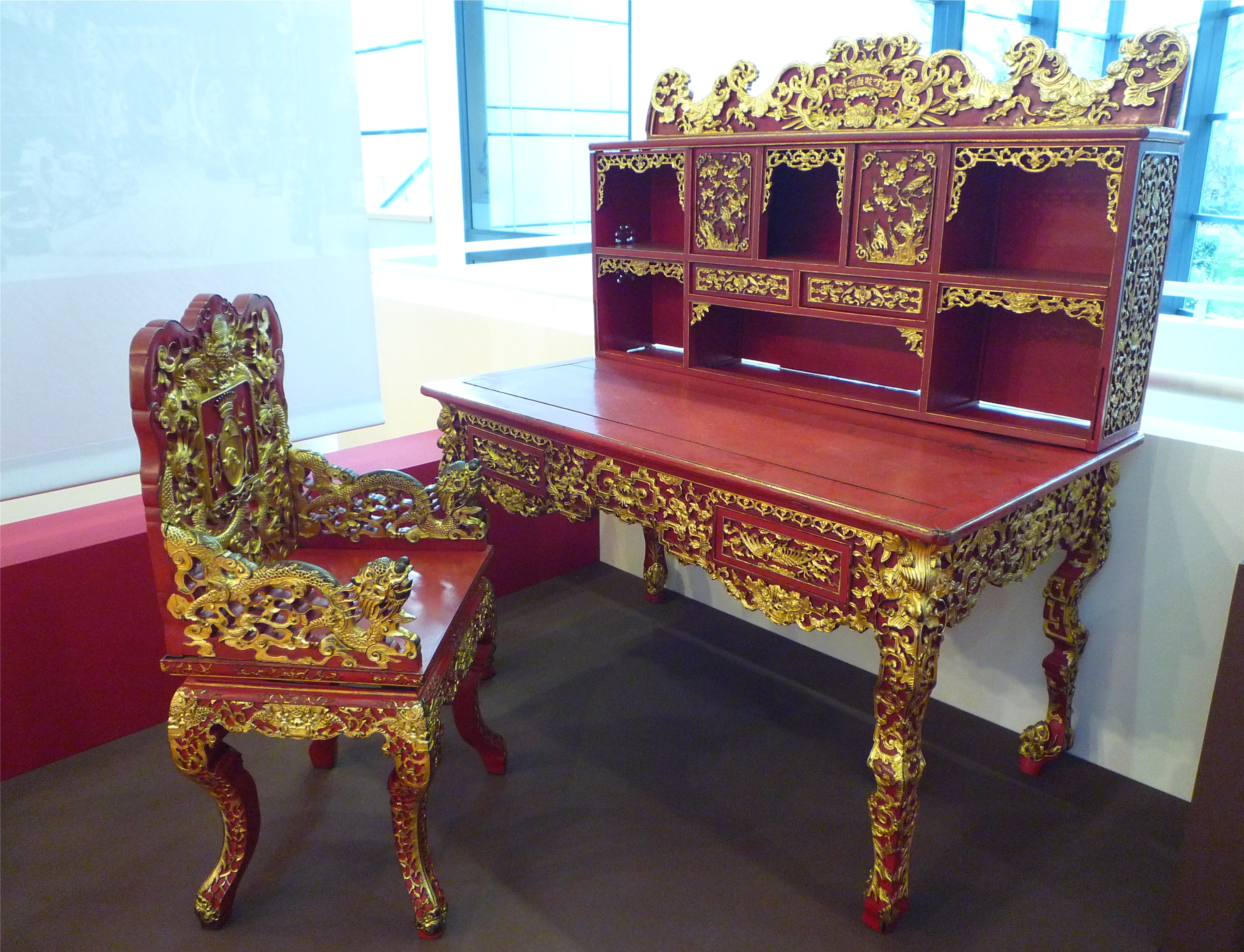 Siège et bureau du général Léon de Beylié (1849-1910). Origine Vietnam, Hanoi fin du XIXe siècle, bois laqué rouge et or. (Musée de Grenoble)